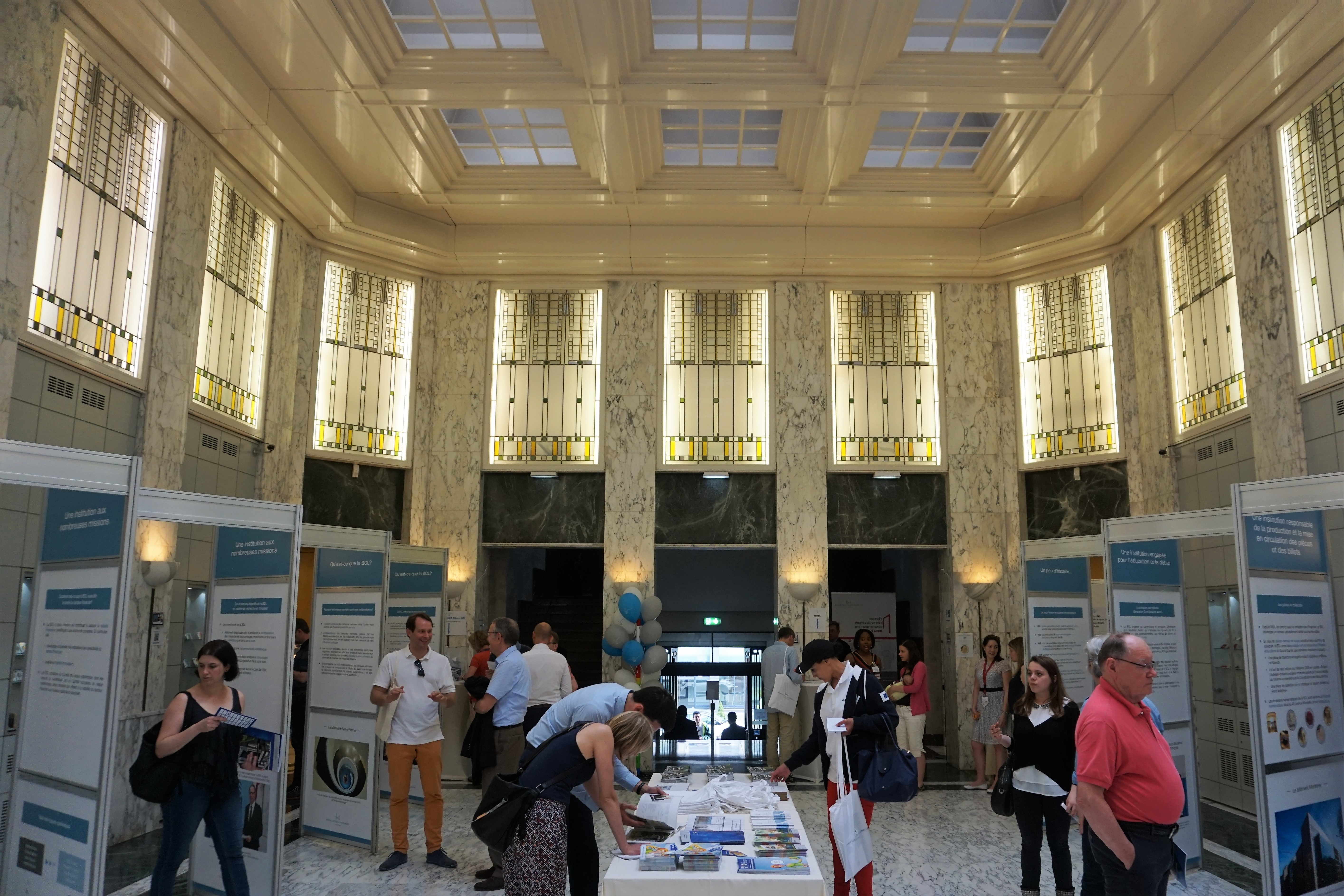 Lëtzebuerg. Am Gebai vun der Zentralbank um Boulevard Royal an der Stad um Dag vun de "Journée Portes ouvertes des institutions".